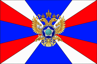 Флаг Службы внешней разведки Российской Федерации (СВР) Описание: Прямоугольное полотнище, на котором изображен четырехконечный синий (васильковый) крест с расширяющимися концами и с равноразделенными бело-красными углами между концами креста. Белые половины углов примыкают к вертикальным концам креста. В центре полотнища изображен геральдический знак - эмблема Службы внешней разведки Российской Федерации. Отношение ширины флага к его длине - два к трем. Отношение высоты эмблемы к ширине флага - один к двум. Утвержден Указом Президента Российской Федерации N 1233 от 31 октября 2009 года.